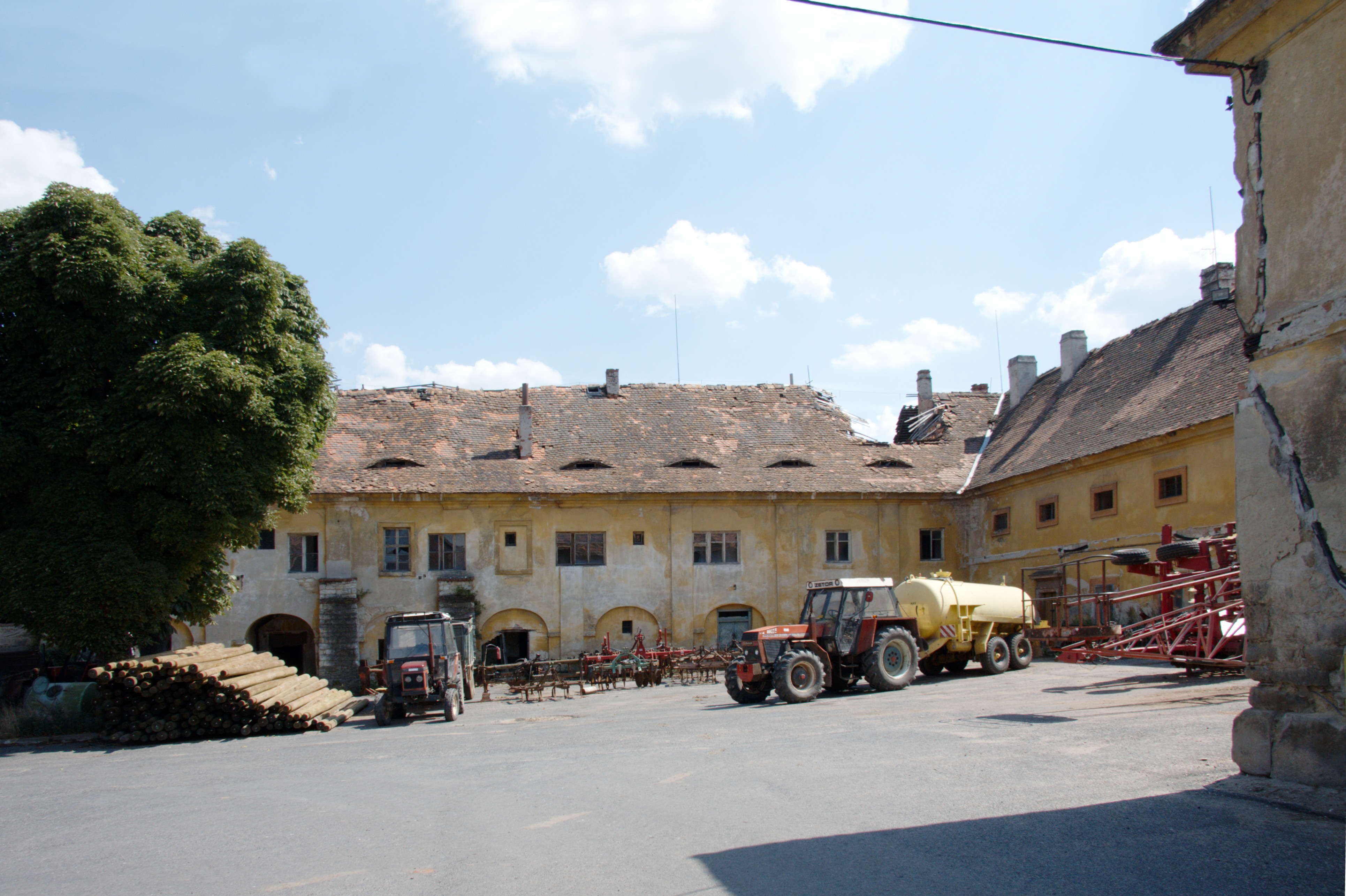 Lipno (okres Louny), areál vrchnostenského dvora, dvorní průčelí zámecké budovy a sýpky od severu